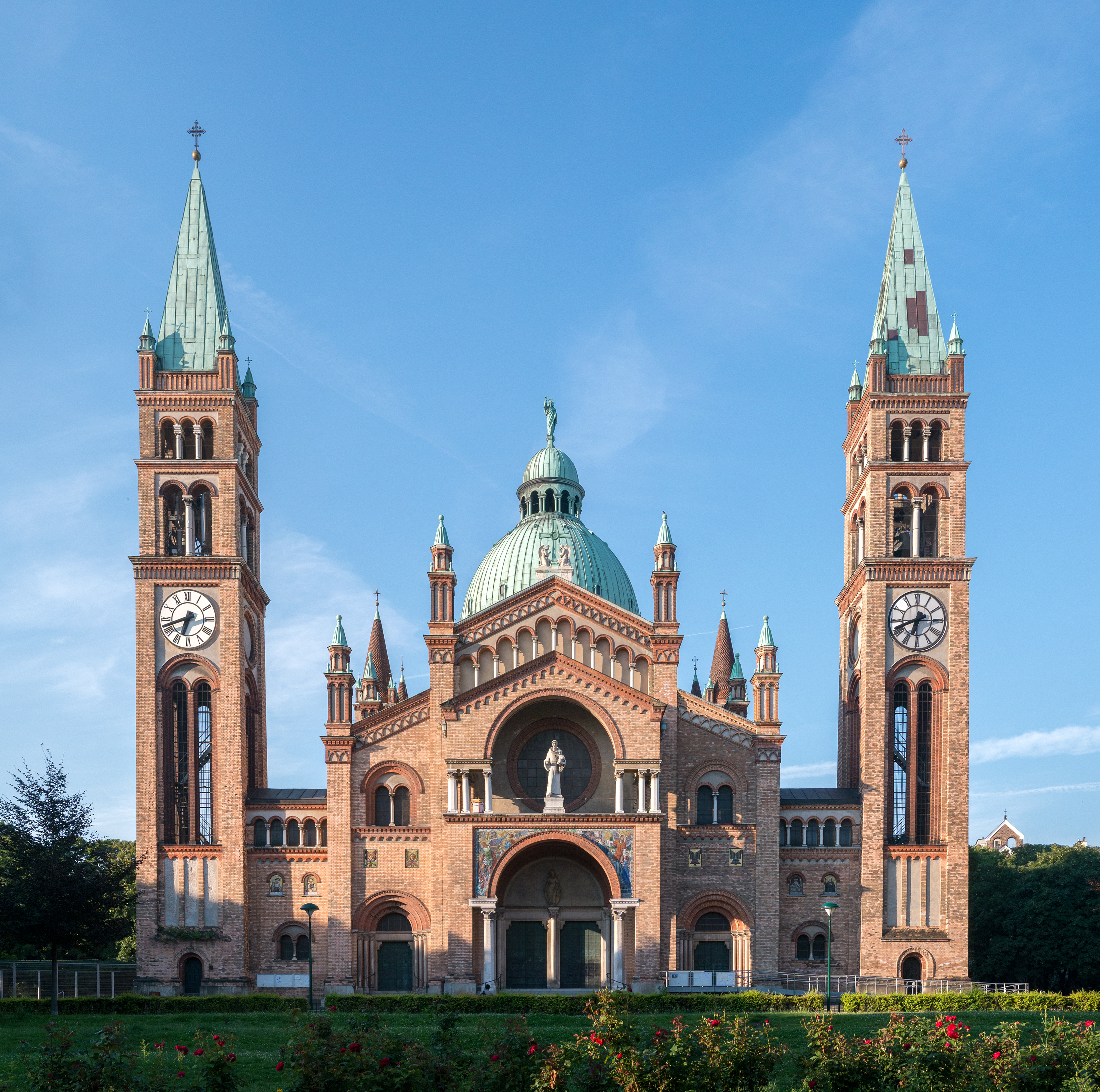 Kath. Pfarrkirche hl. Antonius von Padua